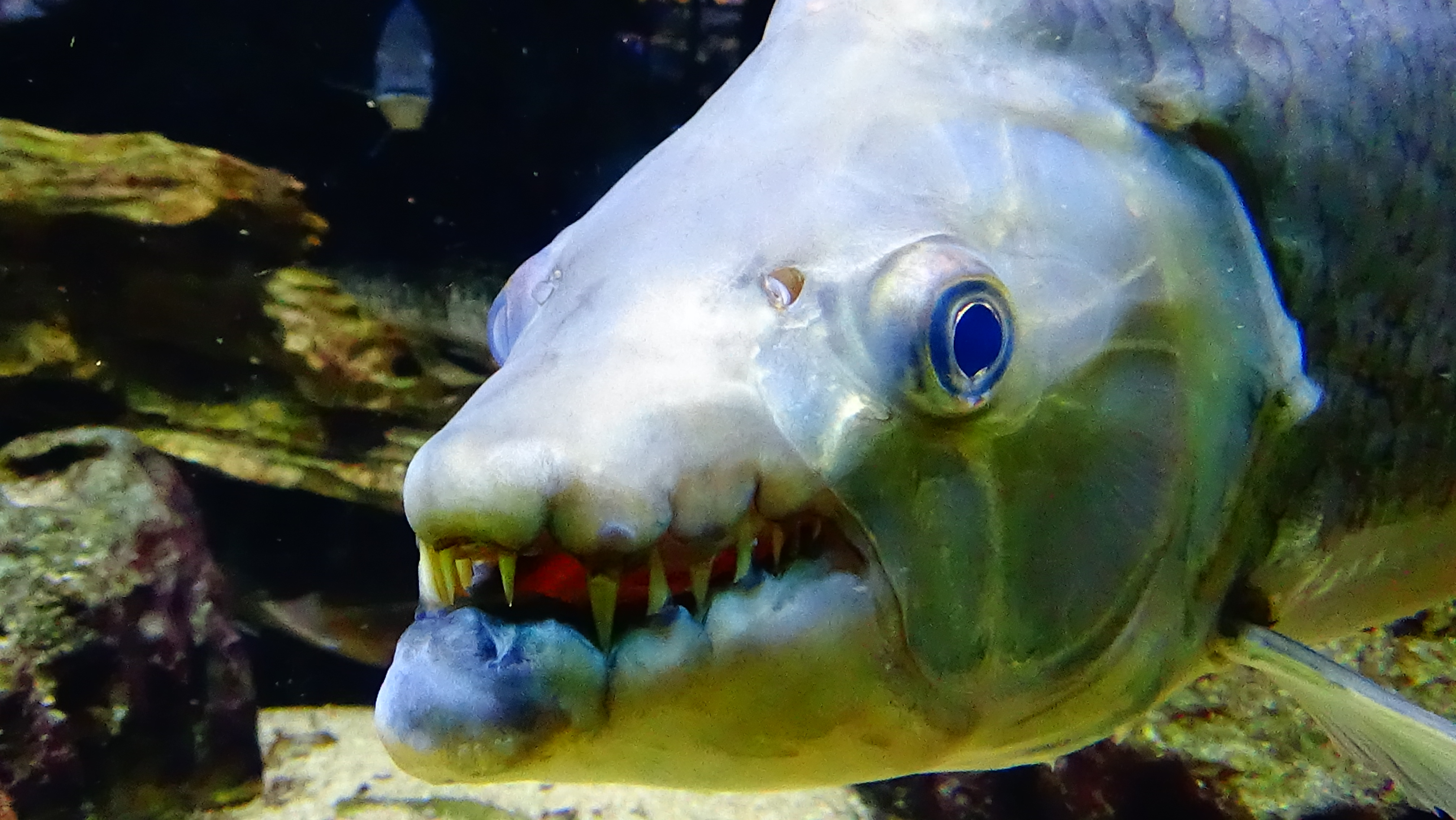 Hydrocynus goliath - Poisson-chien - Aquarium tropical du Palais de la porte Dorée, Paris, ile de France, France - 12/2014